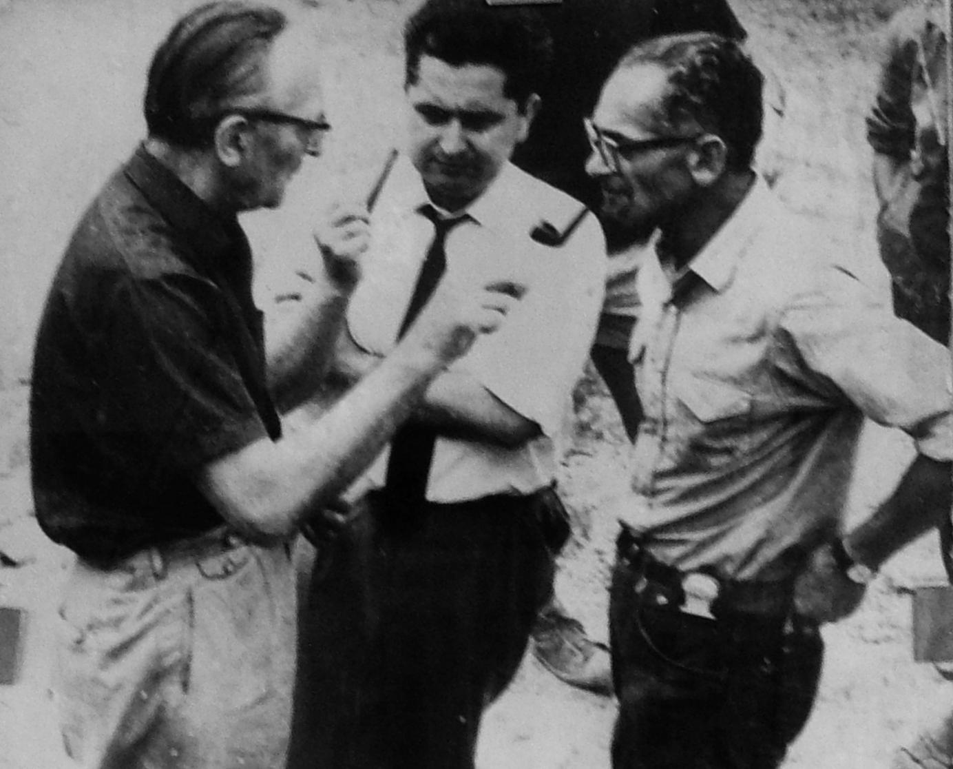 Vértes László (jobbra) Vértesszőlősön